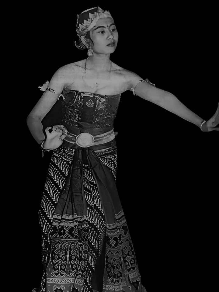 Suyati Tarwo Sumosutargio adalah seorang penari klasik khas Mangkunegaran yang bergelar Kanjeng Raden Nganten Tumenggung (K.R.Ng.T) Suyati. Dia tinggal di Sangkrah, Kota Surakarta dan terlahir dari keluarga yang tidak memiliki latar belakang seniman ataupun keturunan priayi dari Pura Mangkunegaran.